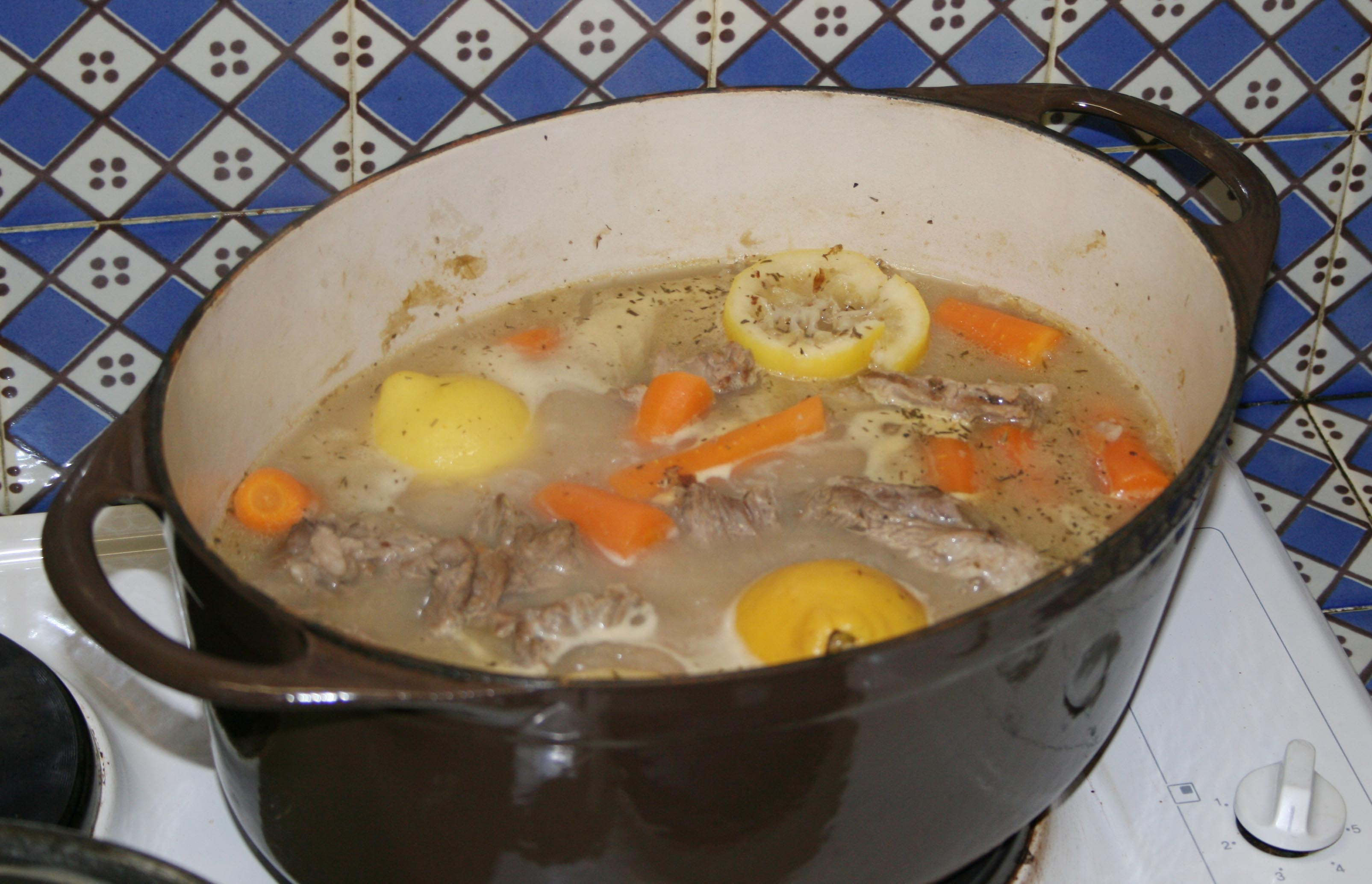 Blanquette de veau à l'ancienne